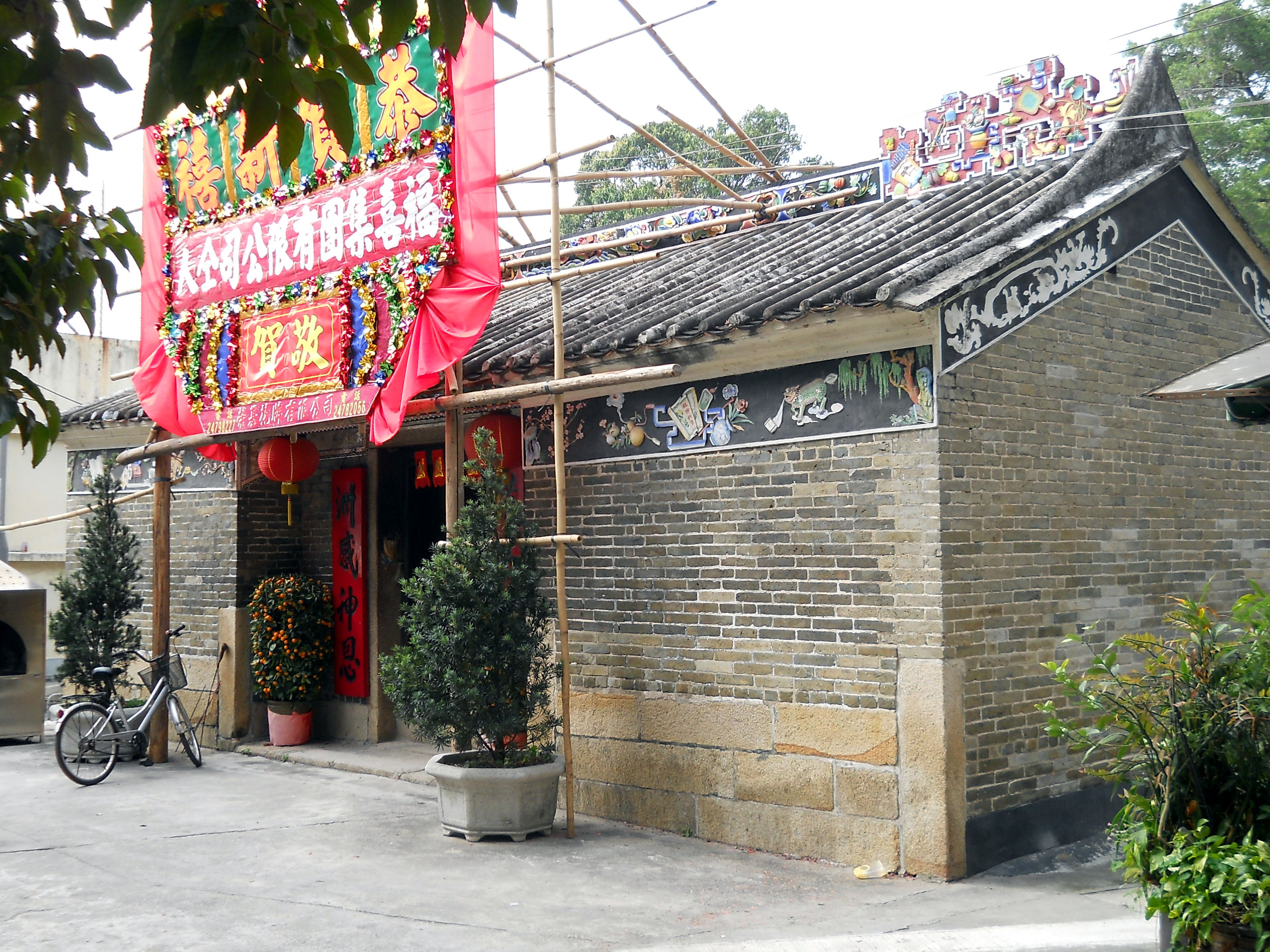 中文（香港）: 橫洲二聖宮